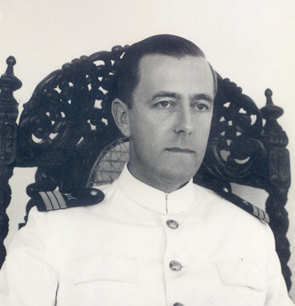 D.Miguel António do Carmo de Noronha de Paiva Couceiro, Conde de Paraty, Governador de Diu